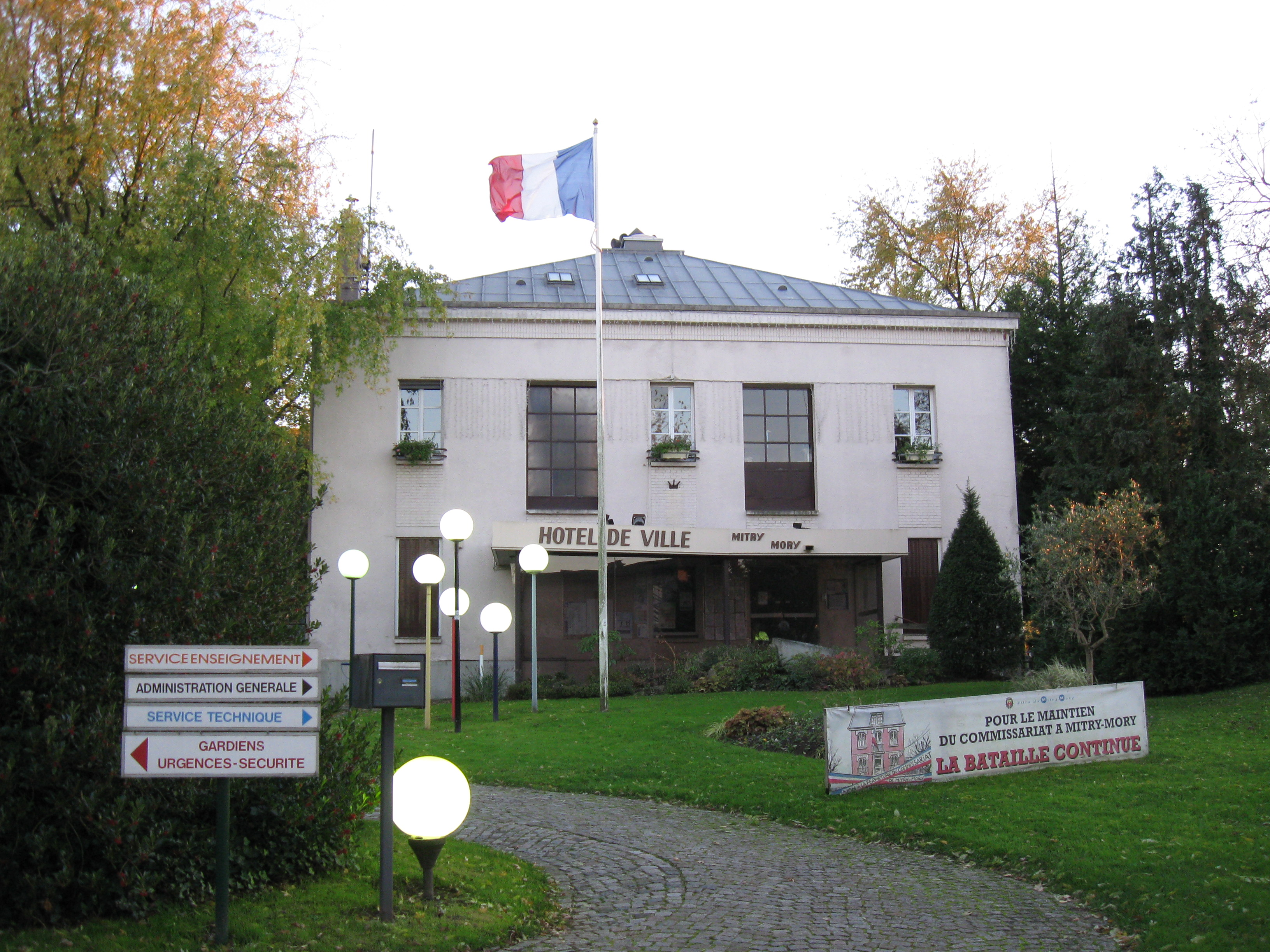 Mairie de Mitry-Mory. (département de la Seine-et-Marne, région Île-de-France).